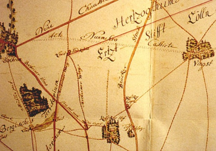 Karte von Köln-Kalk und Umgebung aus dem Jahre 1773